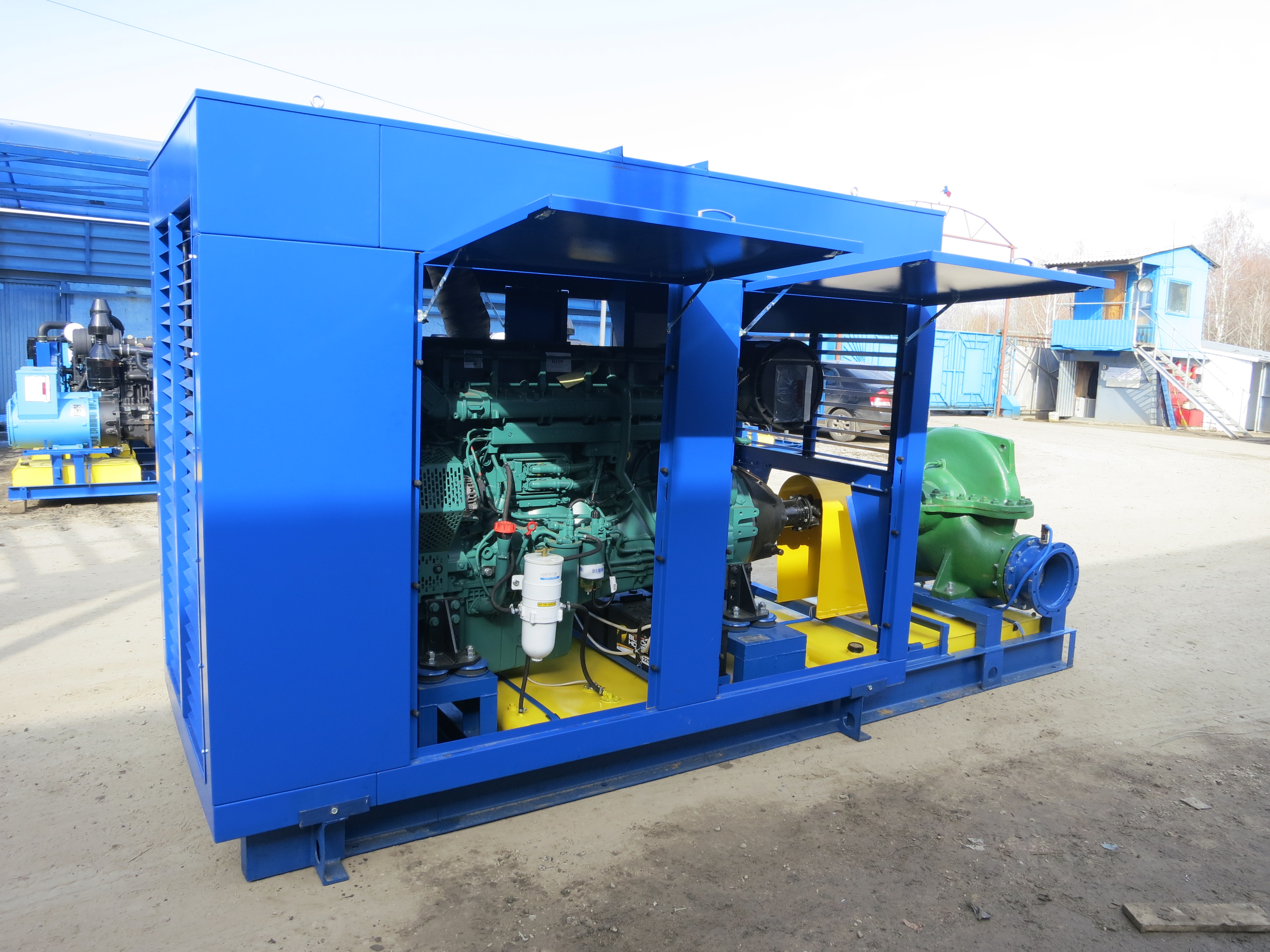 Дизельная насосная установка марки ПСМ. Демонстрировалась на конференции поставщиков в октябре 2012 года.